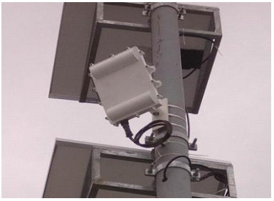 高雄市車輛偵測器